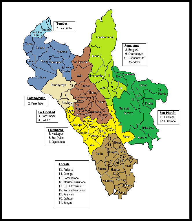 Provincias del norte peruano